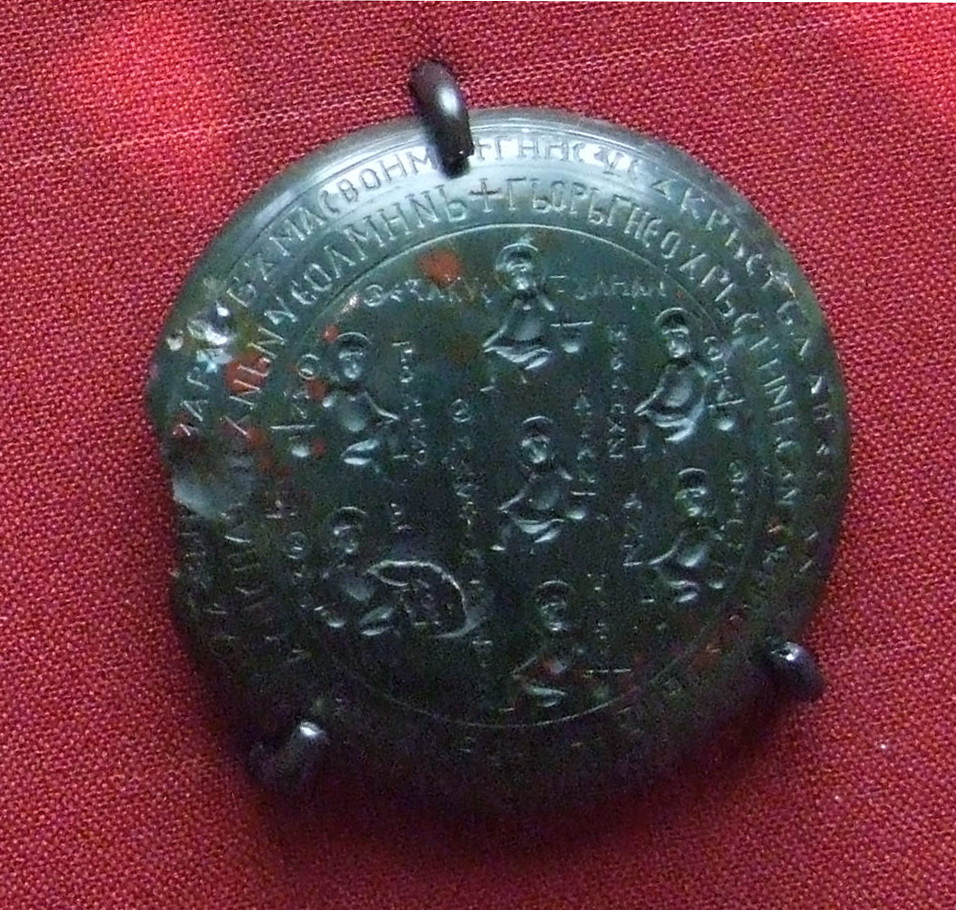 ЗМЕЕВИК Конец XII – начало XIII века Суздаль (?) Яшма; резьба Диаметр – 6 Поступил в 1890 году Происходит из ризницы Рождественского монастыря в Суздале ГИМ инв. 19726, ОК 15560 Амулет-змеевик из кровавой яшмы был найден в Суздале в 1890. Ученые датируют его концом XII в. – нач. XIII в. Он принадлежал Марии Шварновне, супруге Всеволода III Большое Гнезде, бабушке Александра Невского. На обеих сторонах змеевика - резные изображения, причем сюжеты сочетают в себе христианские и языческие мотивы.